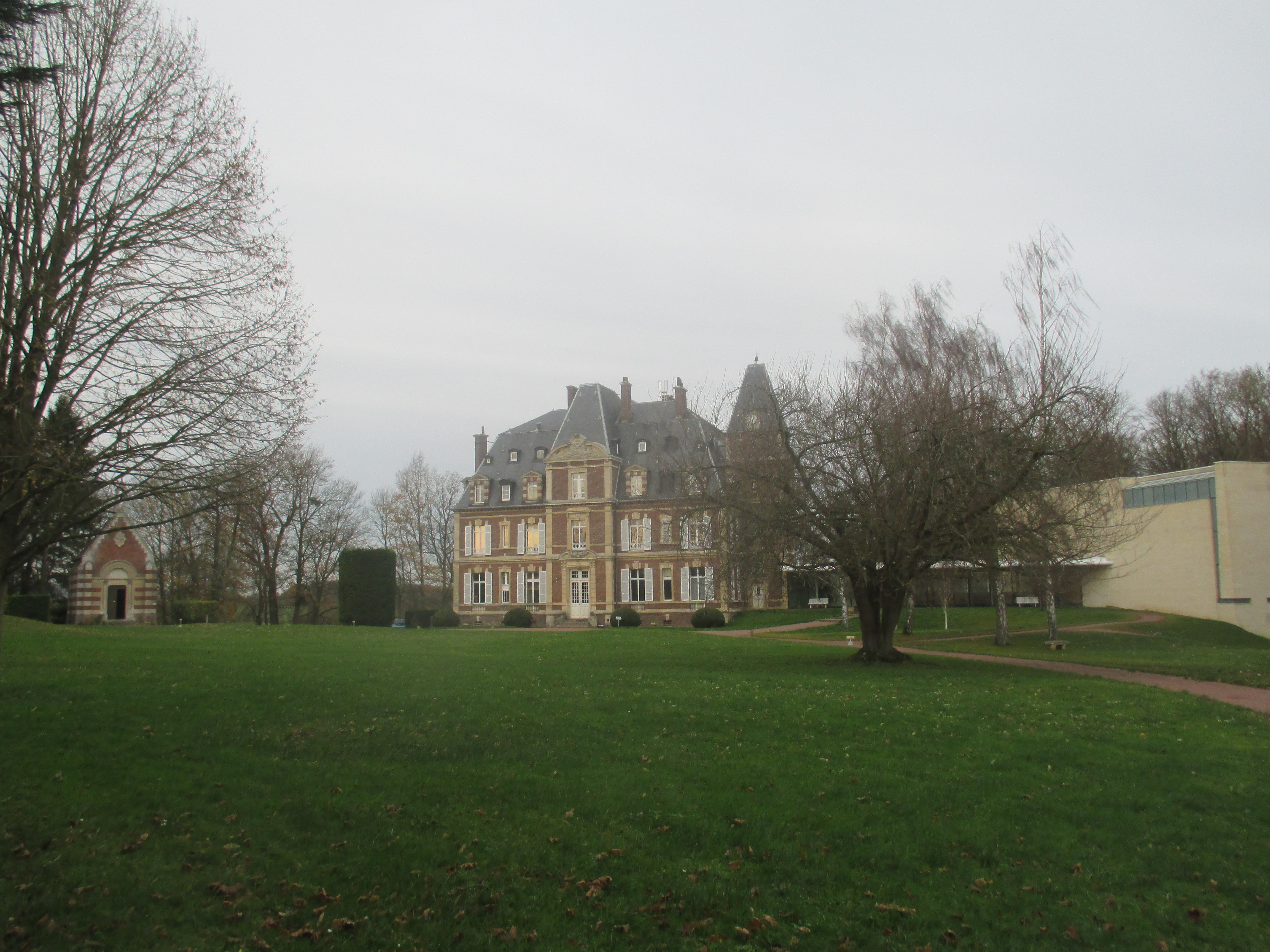 Château de Troussures construit en 1890. Aujourd'hui prieuré Notre-Dame-de-Cana de la Communauté Saint-Jean.